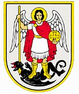 סמל העיר שיבניק